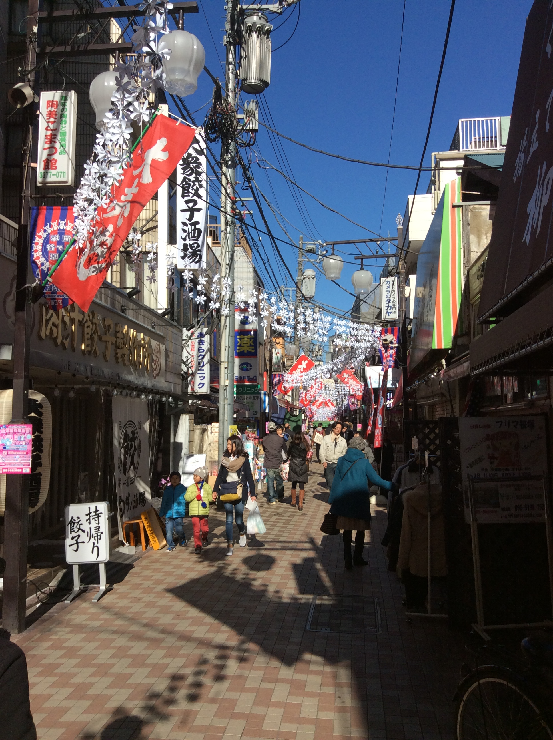 2014年（平成26年）12月13日、